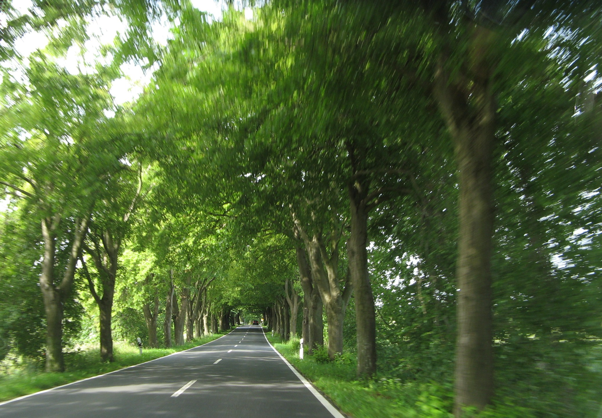 Deutsche Alleenstraße auf Rügen